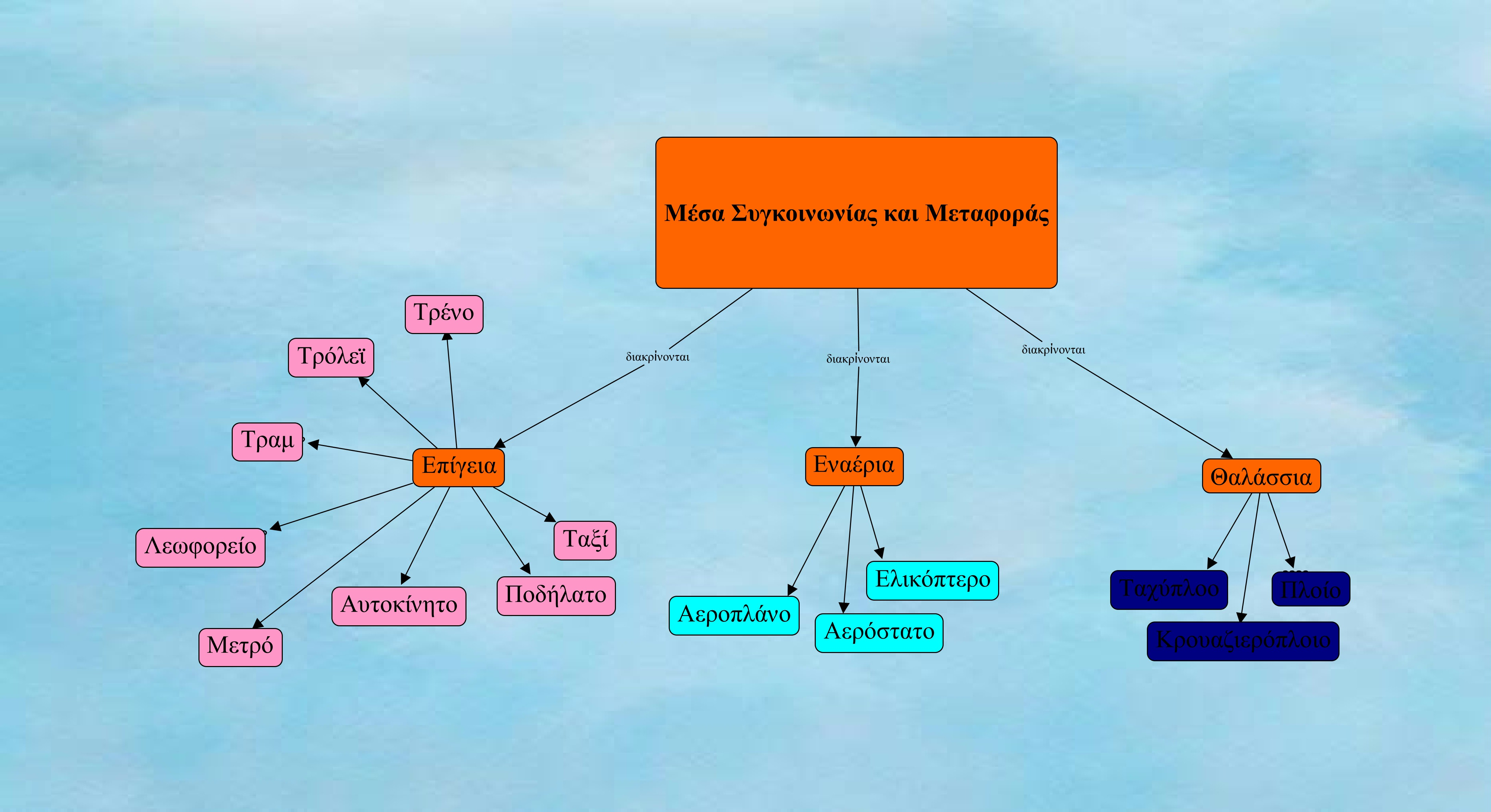 Εννοιολογικός χάρτης μεταφορικών μέσων